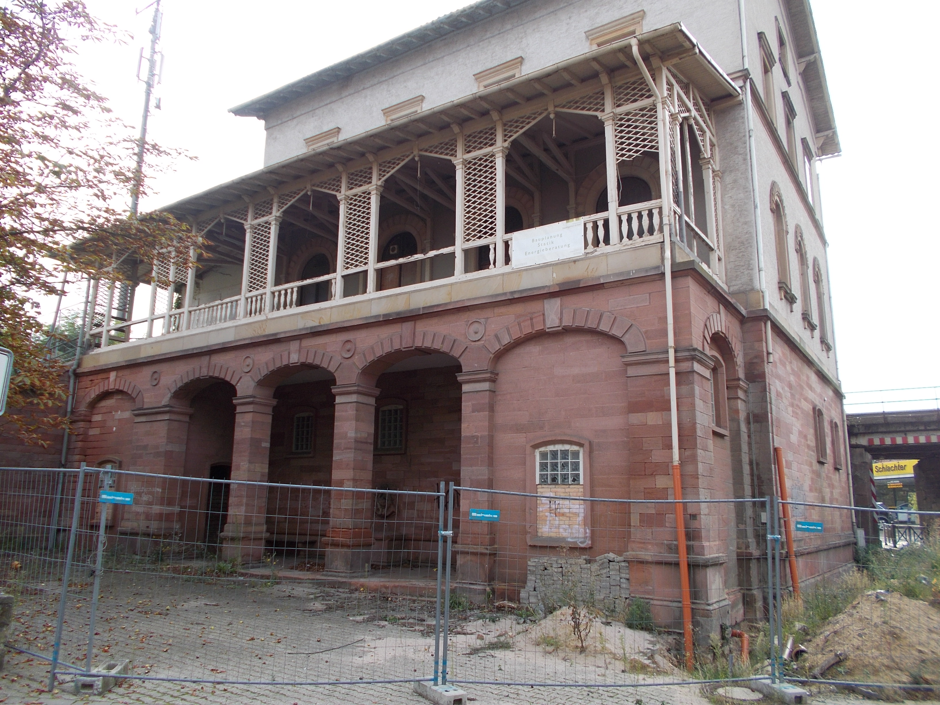 dreigeschossiger Putzbau mit Sandsteinportikus und hölzerner Überdachung, 1872/73